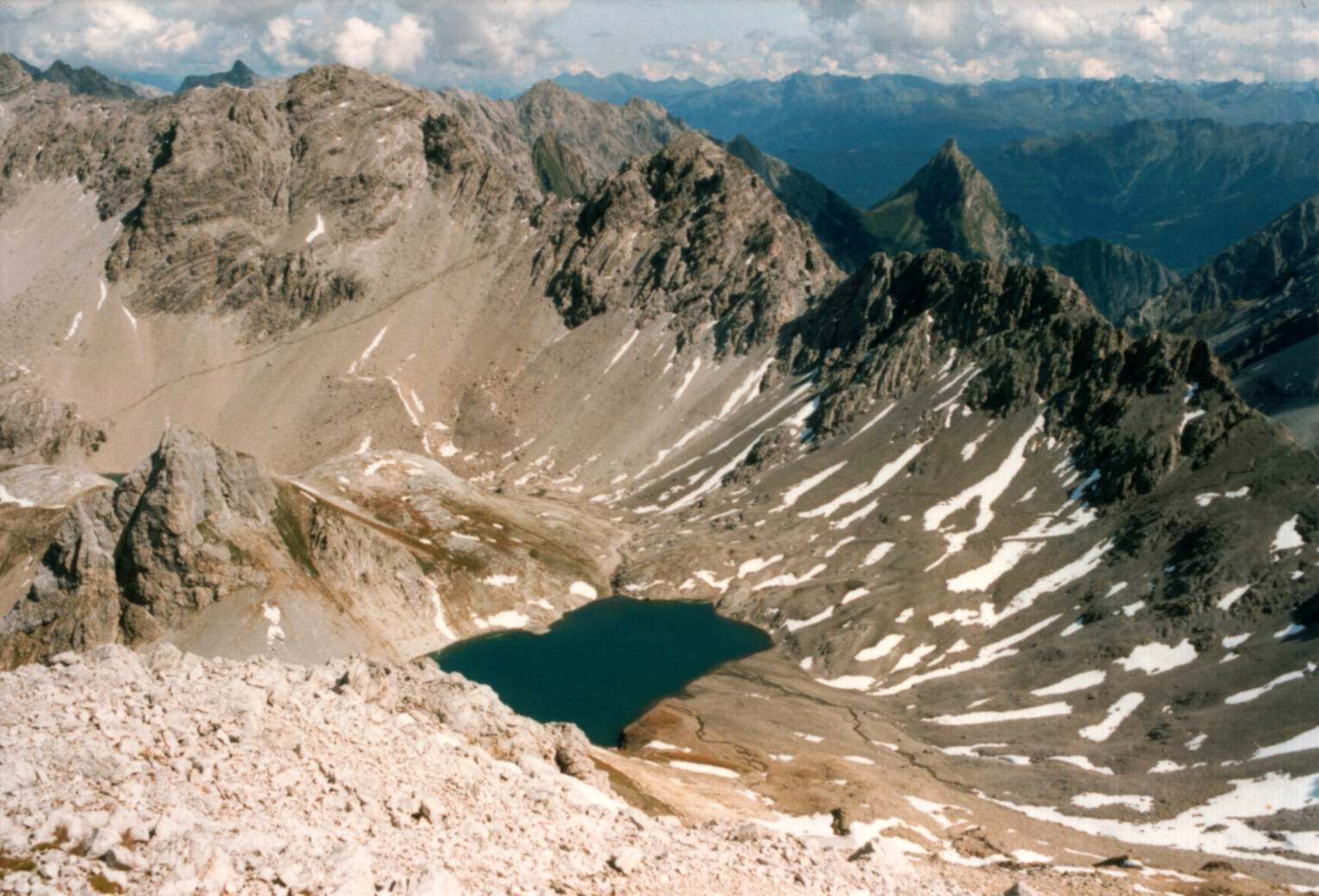 Blick zum Oberen Seewisee